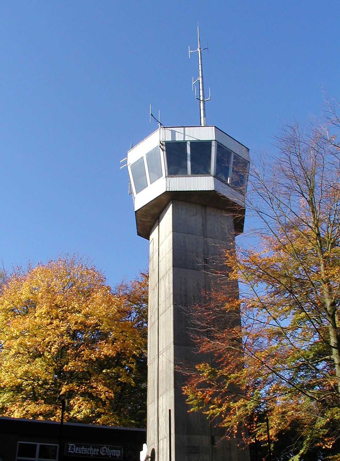 Der Aussichtsturm auf dem Berg "Deutscher Olymp"